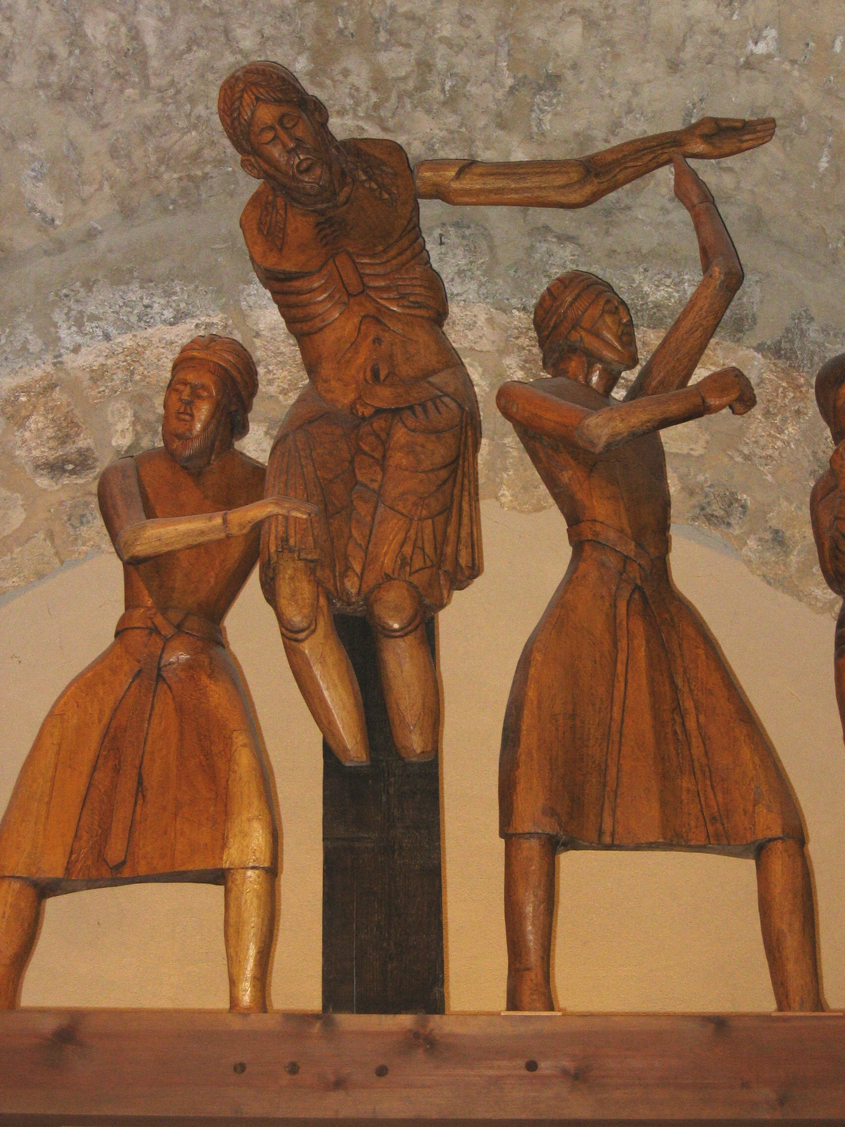 Santa Eulàlia d'Erill la Vall church